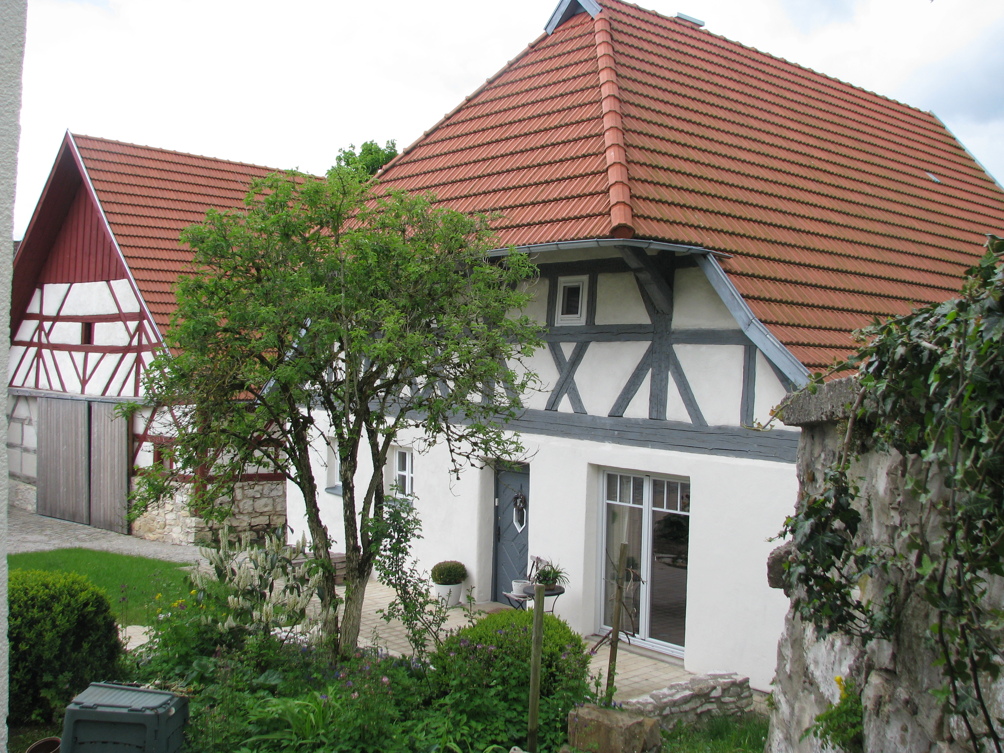 Stöckelsberg, Ortsteil der Gemeinde Berg bei Neumarkt in der Oberpfalz, Baudenkmal Mirlschneiderhof